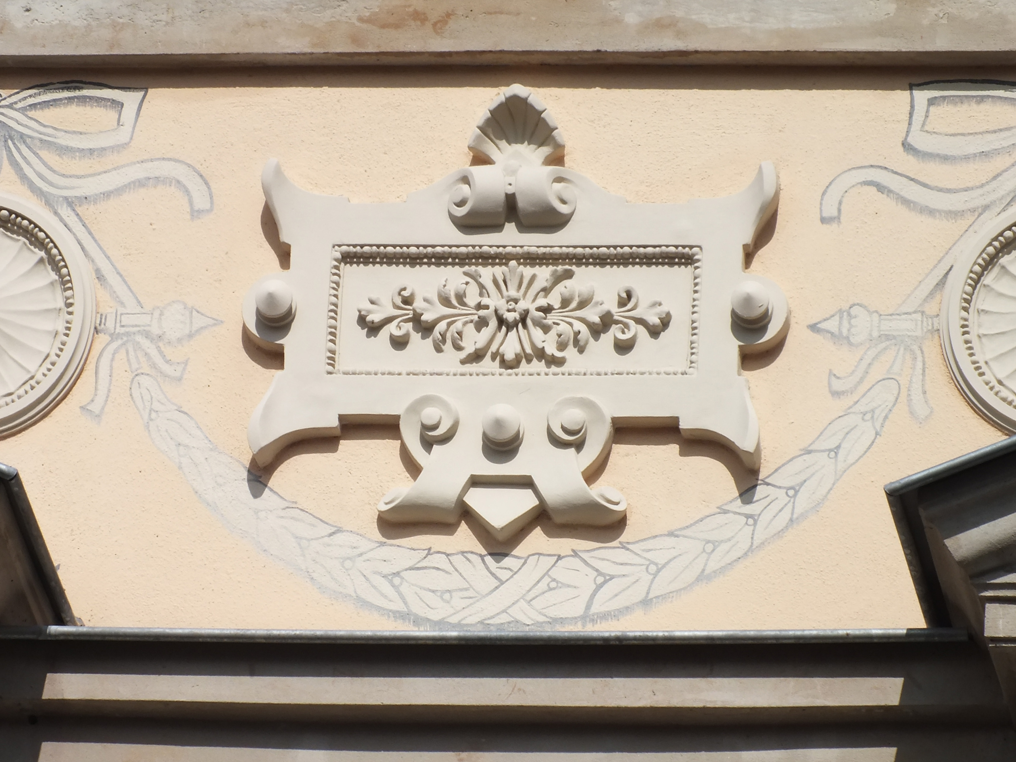 Detail an der restaurierten Villa Schröder in Leipzig, Goldschmidtstraße 31